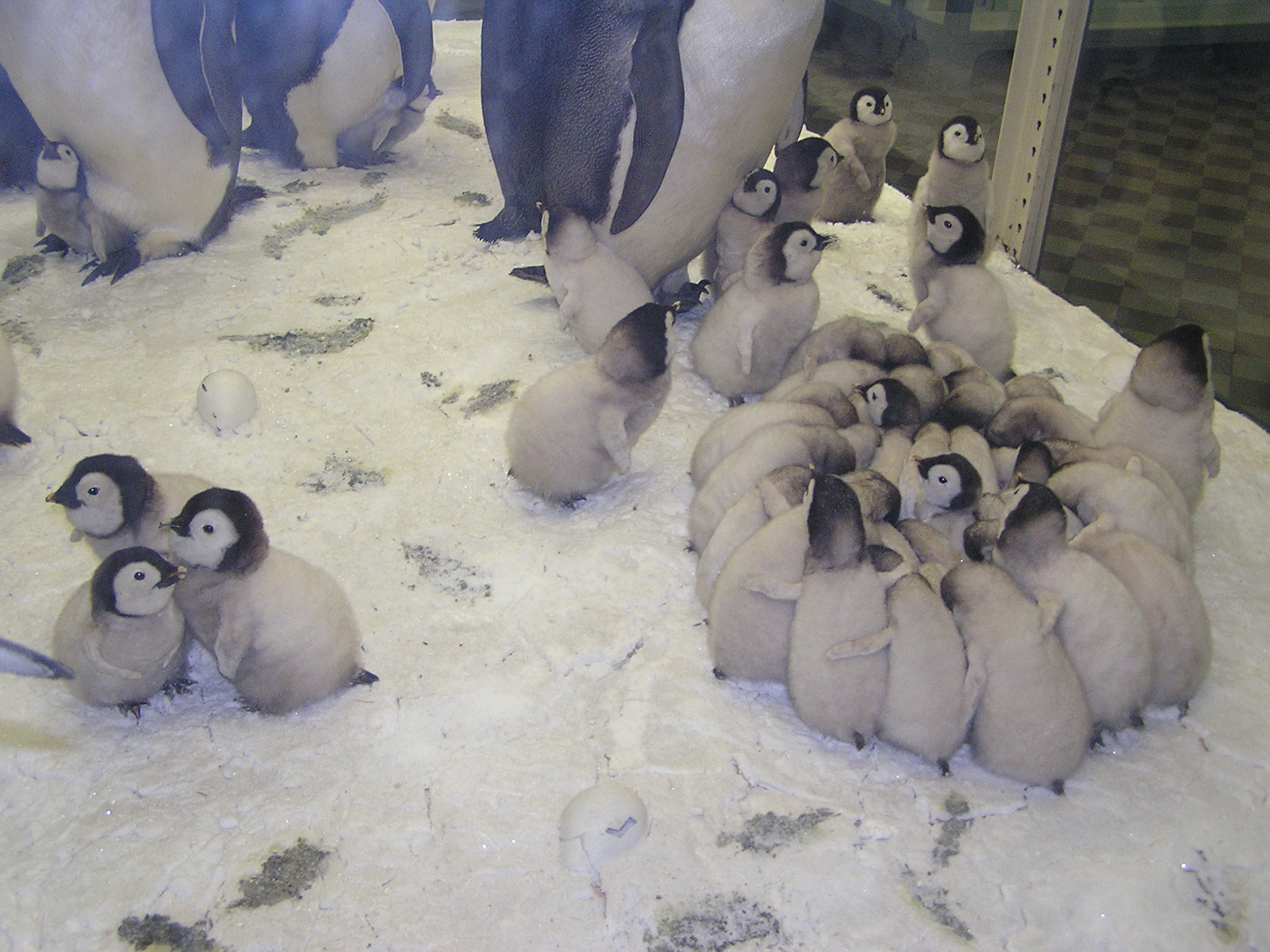 Зоологический музей в Санкт-Петербурге. Птенцы императорского пингвина